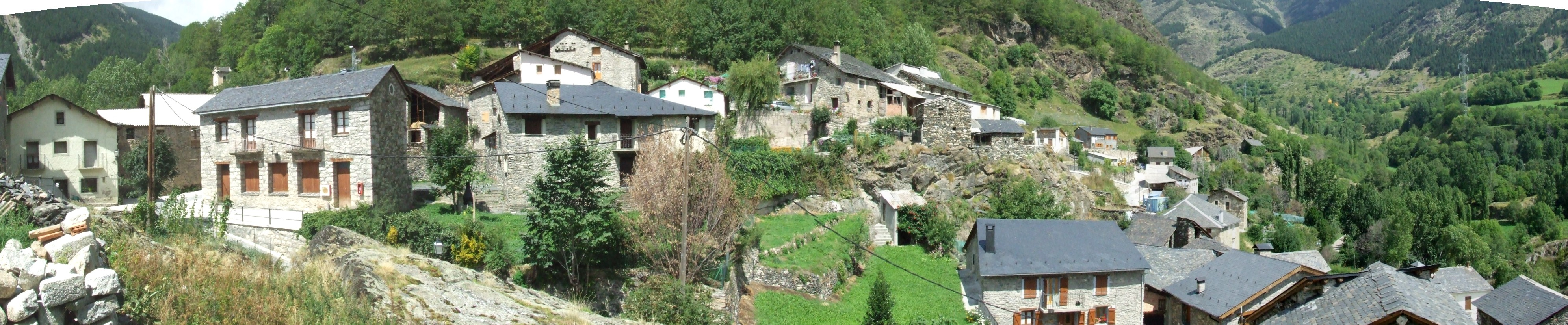 Panoràmica del poble de Cabdella (la Torre de Cabdella, Pallars Jussà)